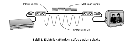 Verilənlərin ötürülmə mühitləri